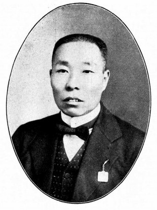 中文（台灣）: 王觀銘議員